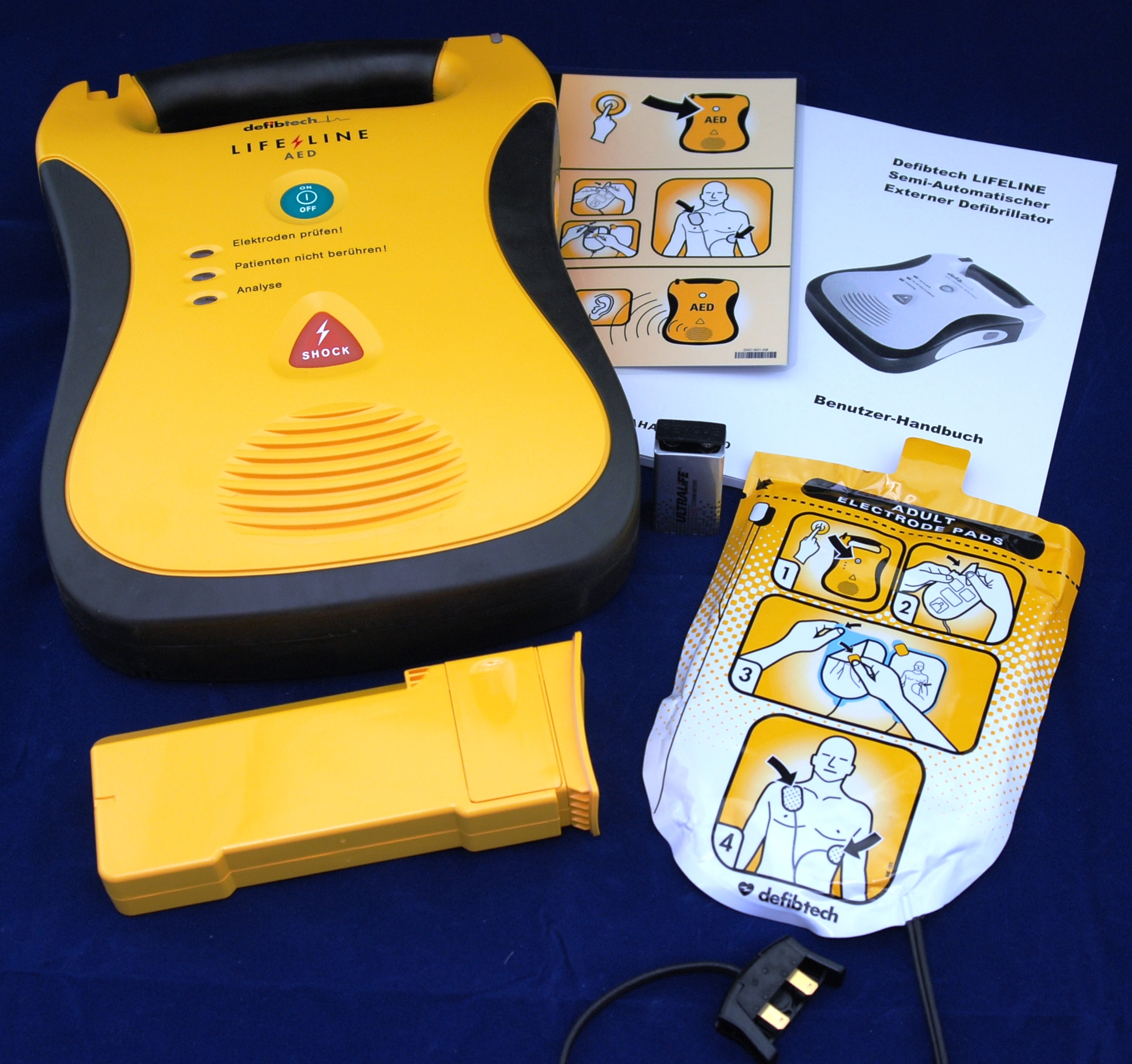 Halbautomatischer Defibrillator mit Elektroden, Akku und Gebrauchsanweisung. Zur Schockabgabe muss der große, rote Knopf betätigt werden. Mit Sprachausgabe, um den Ersthelfer durch die Reanimation zu begleiten.